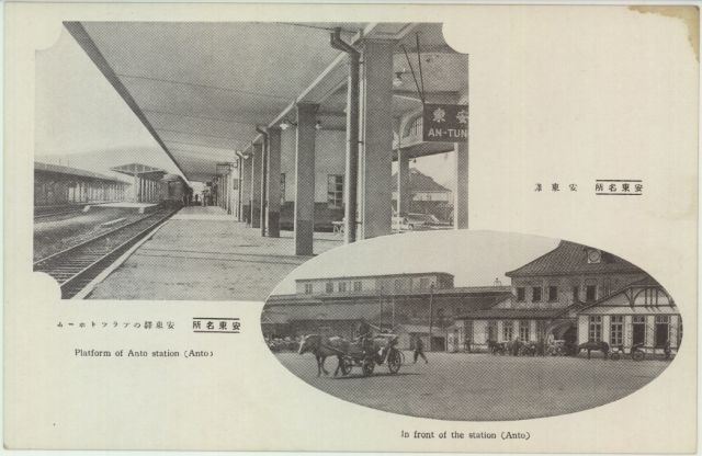 南満州鉄道安東驛のホームと駅舎